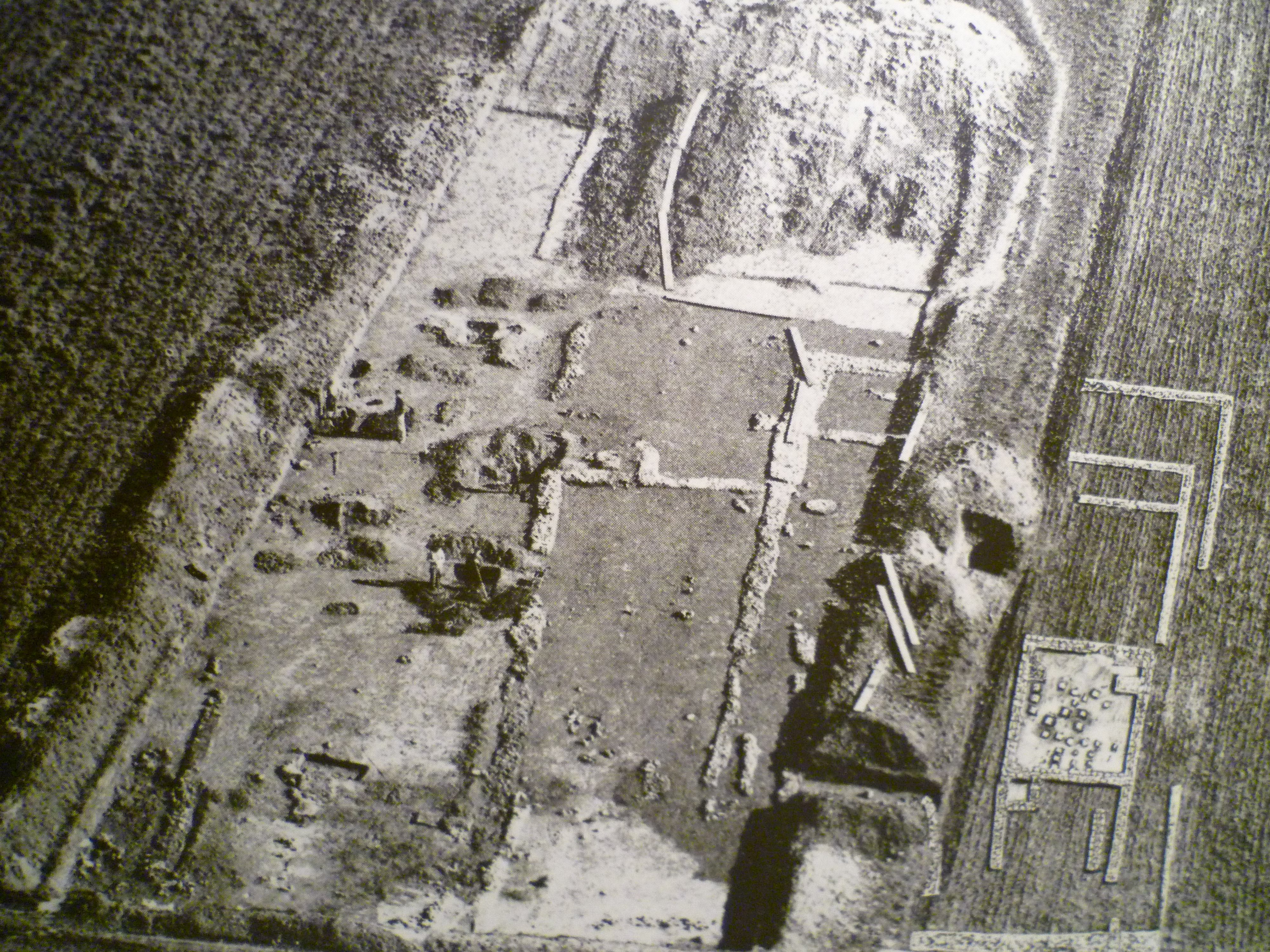 Luftbild der Grabungen am Vicus am Kastell Hofheim 1957, abfotografiert bei der Ausstellung im Stadtmuseum Hofheim.